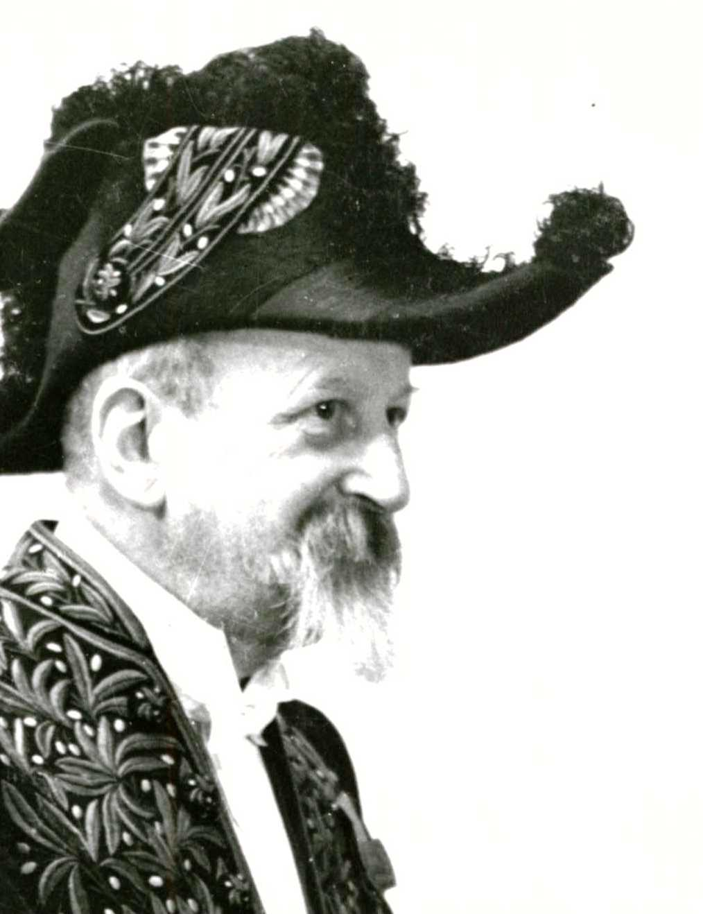 Alfred Merlin, en grand habit vert d’académicien. Photo prise dans son cabinet de travail vers 1937 par sa femme Renée Cagnat. Cette photo le représente à côté de son fils Francois, lui même en tenue de polytechnicien.